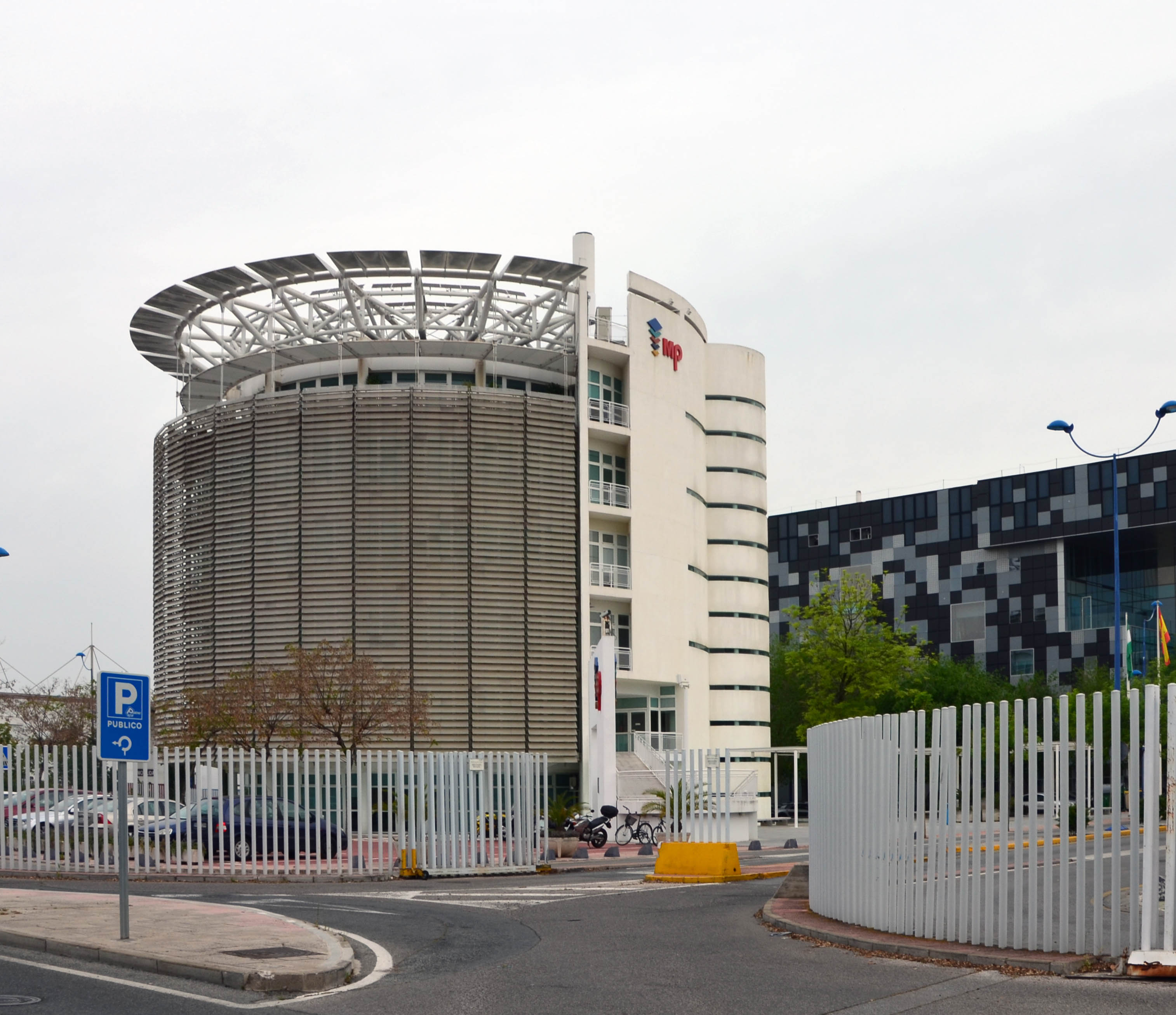 Le pavillon de Siemens de l'exposition universelle de 1992 (Séville, Espagne). Photographié en 2015, il appartient à MP Productividad, une entreprise espagnole spécialisée dans la maintenance industrielle et les services techniques et d'ingéniérie.